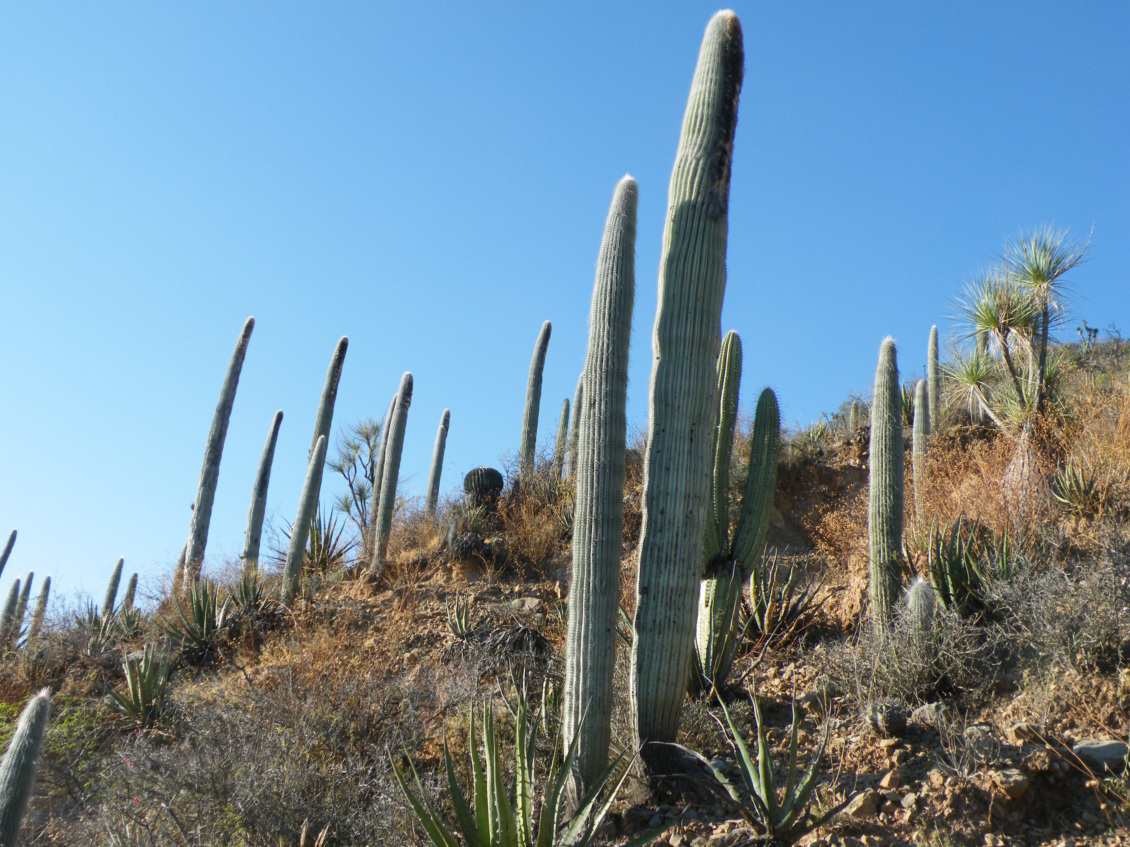 Zapotitlan De Las Salinas, Puebla